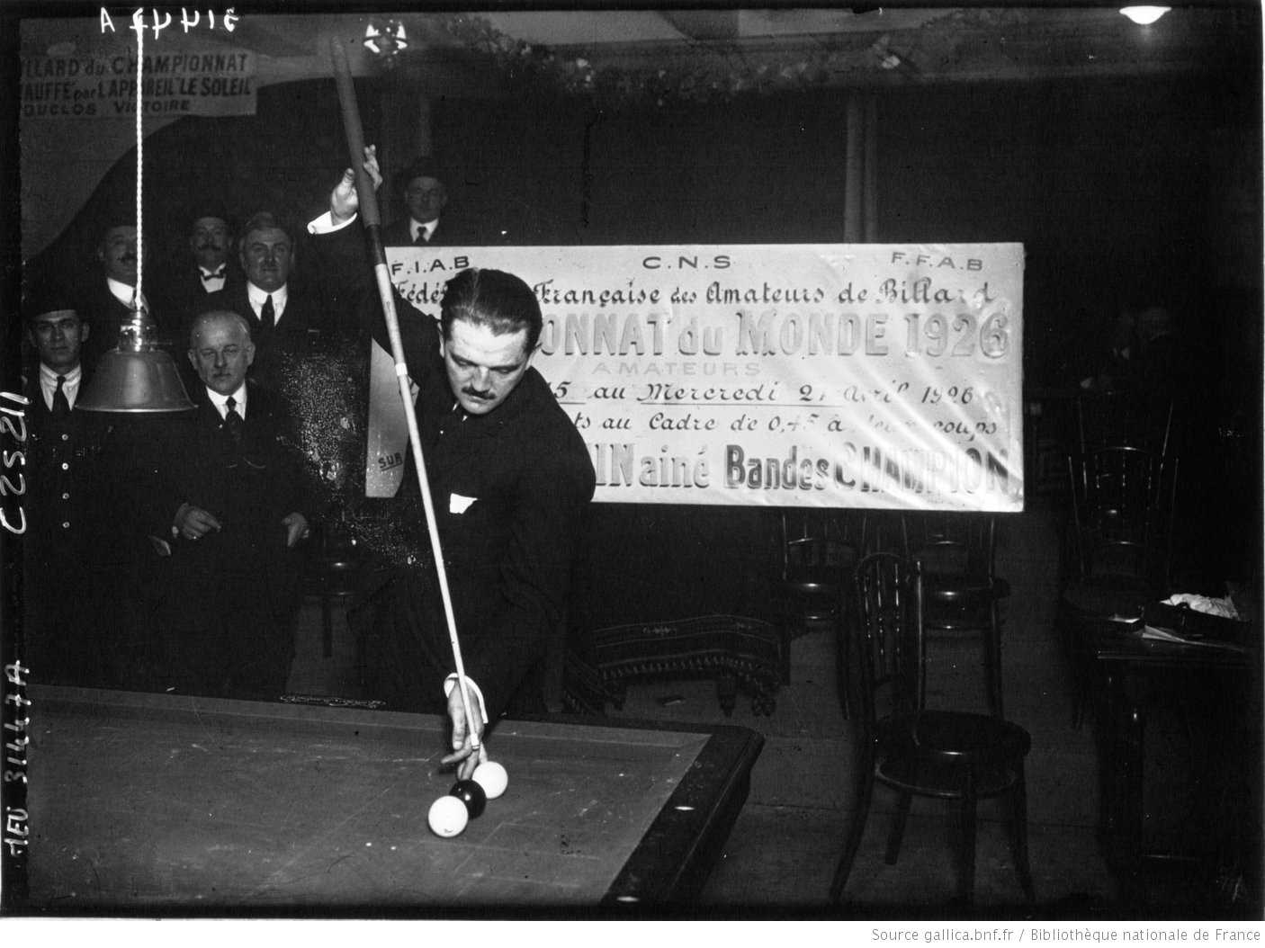 Théo Moons bei der Cadre 45/2 WM 1926 in der Académie des Abbesses in Paris